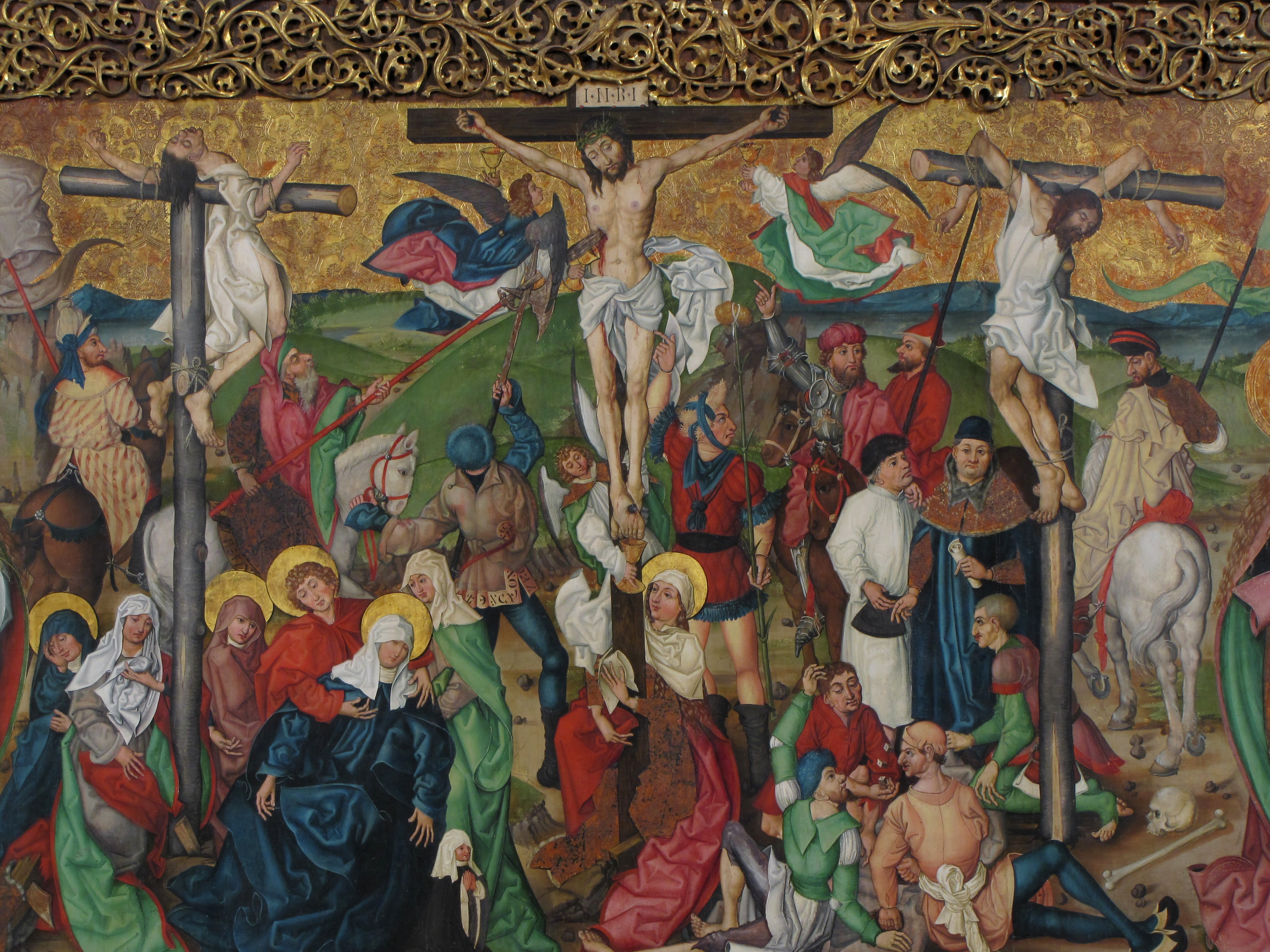 Alsace, Haut-Rhin, Église Saint Jean Baptiste de Buhl (PA00085356, IA00054793) Retable (triptyque, volets ouverts) : Passion du Christ (XVe): This object is classé Monument Historique in the base Palissy, database of the French furniture patrimony of the French ministry of culture, under the references PM68000036, IM68000035 and IM68000036.